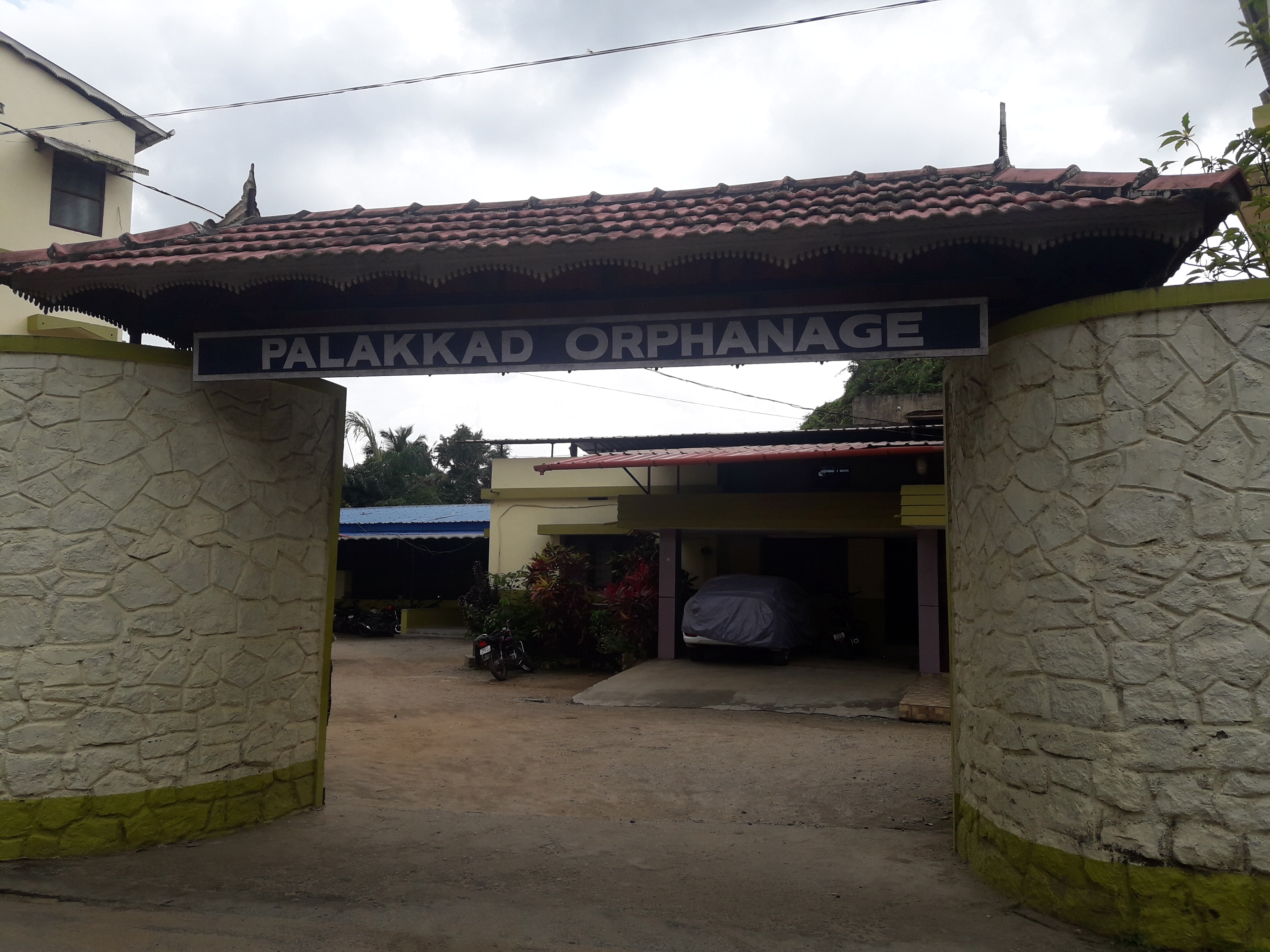 school